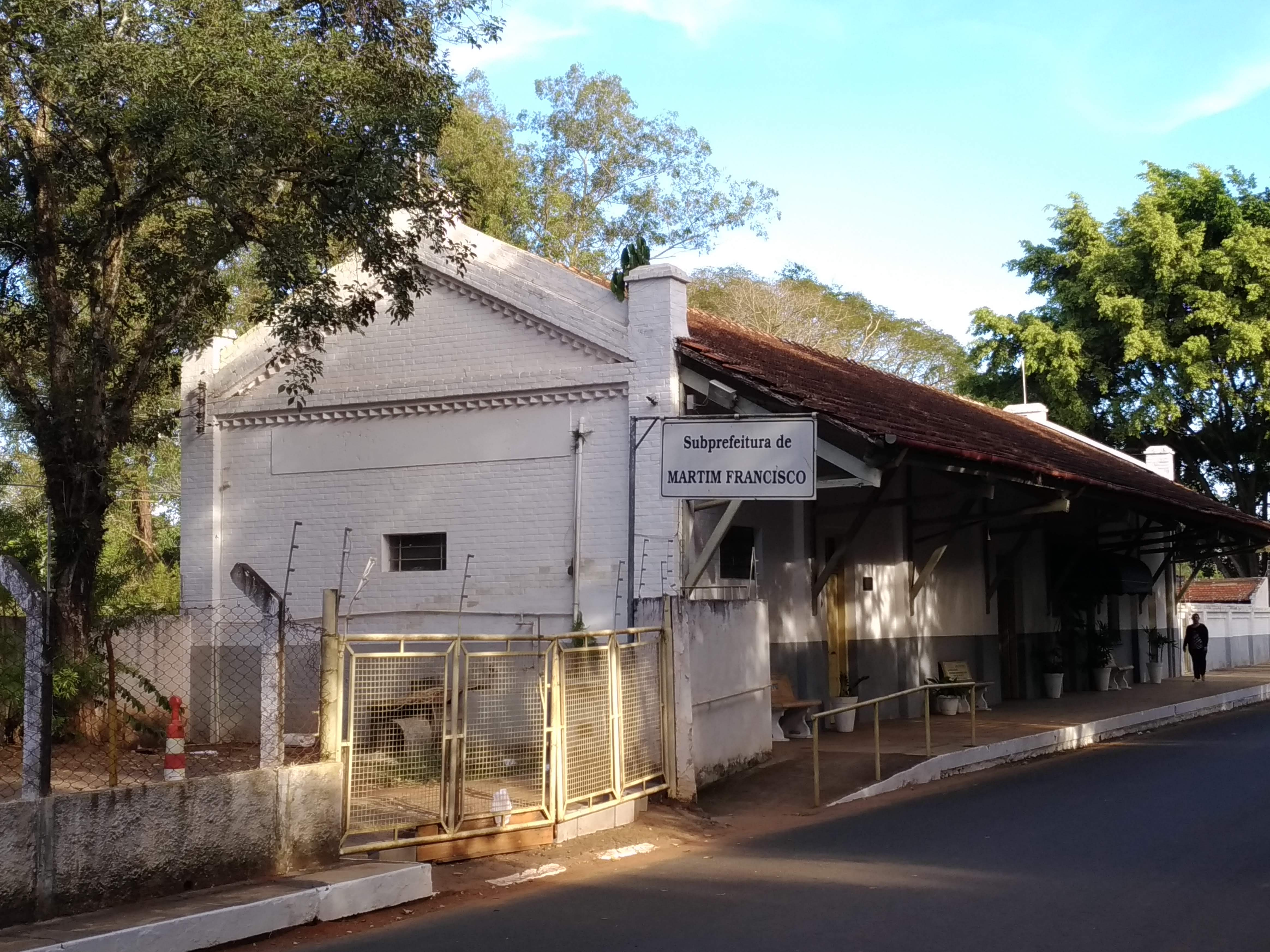 A antiga estação de trem da Companhia Mogiana, se tornou a subprefeitura do distrito de Martim Francisco.